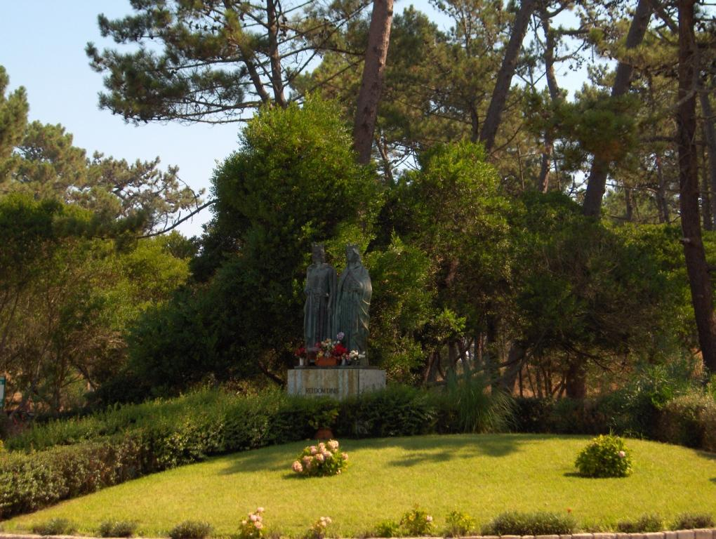 Estátua do Rei D. Dinis e da Raínha Santa Isabel, em São Pedro de Moel.